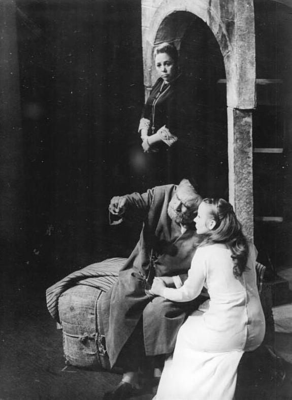 Zentralbild MTI ba 19.5.71 UVR Deutsches Theater gastierte in Budapest Das Deutsche Theater gastierte am 23. Oktober 1970 mit Lessings Stück "Nathan der Weise" am Nationaltheater in Budapest. Unser Foto zeigt eine Szene mit Else Grube-Deister, Wolfgang Heinz und Christine Schorn.